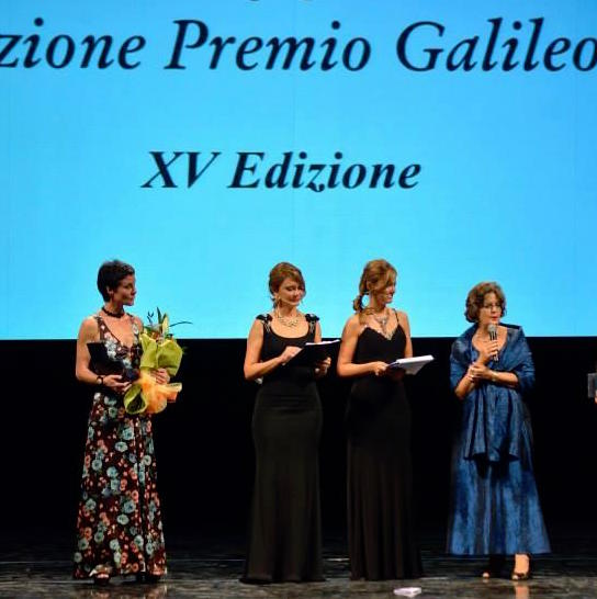 Maria Clark reçoit le prix Pentagramme d'Or - Art et Culture de la Fondazione Premio Galileo 2000, le 23 septembre 2013 à Florence (Italie).